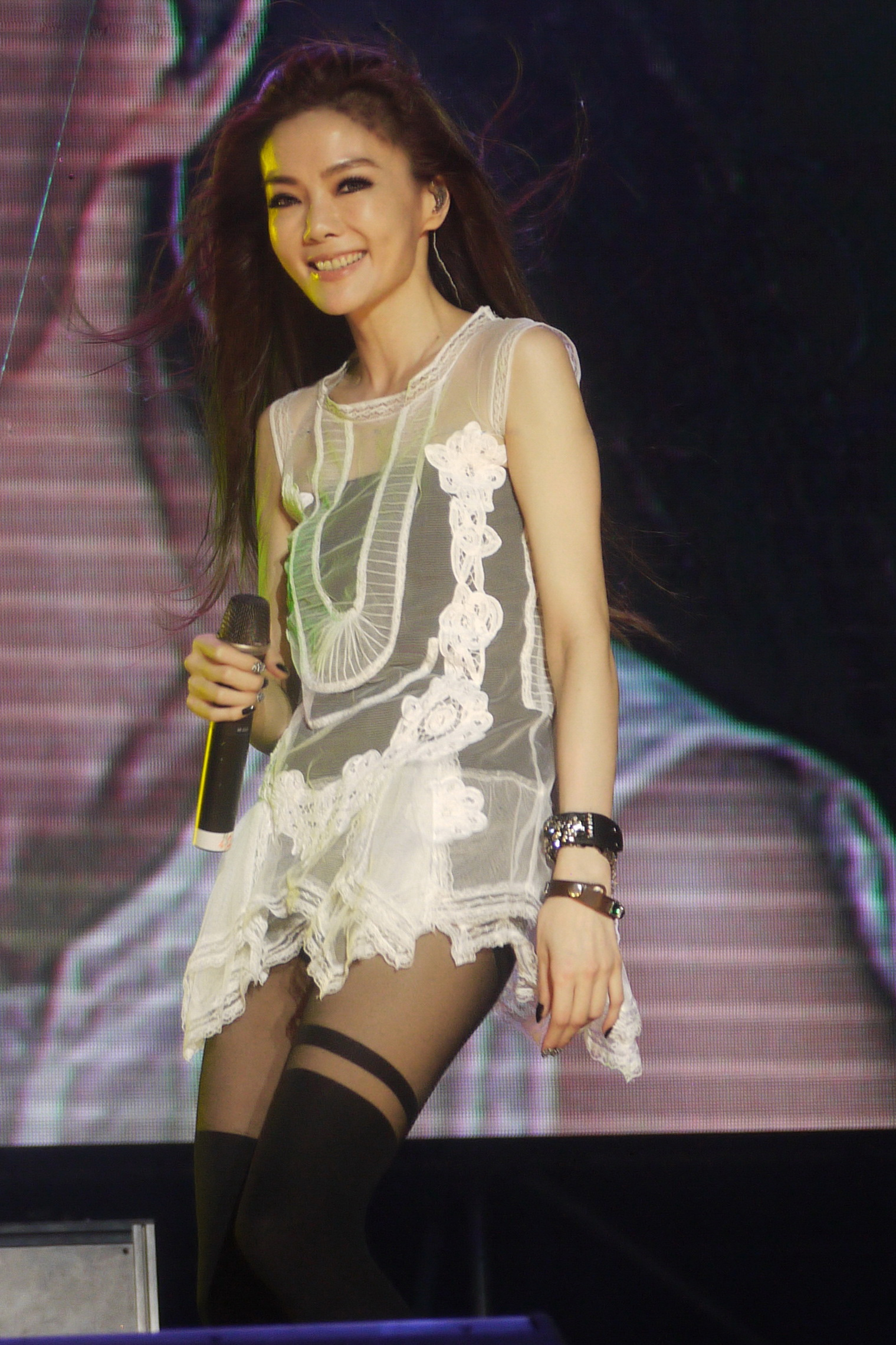 謝金燕於「2013桃園好客海洋音樂季」表演。【沉魚落燕】謝金燕專屬後援會特派員拍攝。